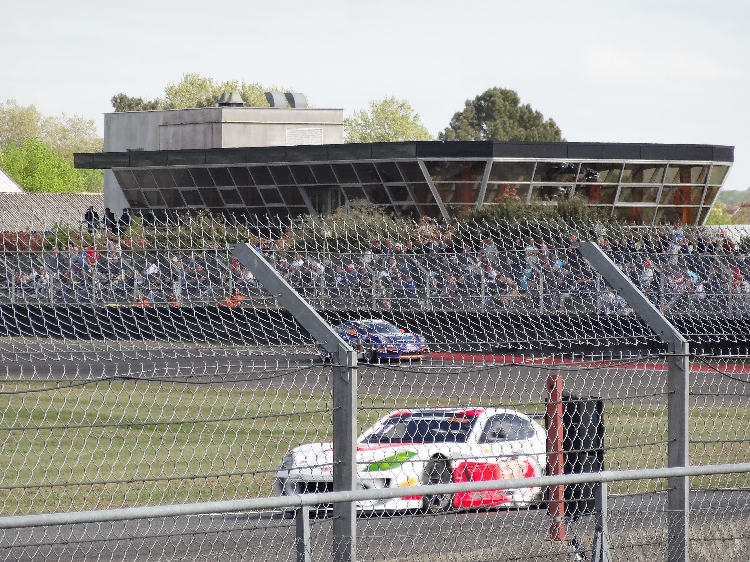 Coupes de Pâques 2017 à Nogaro.